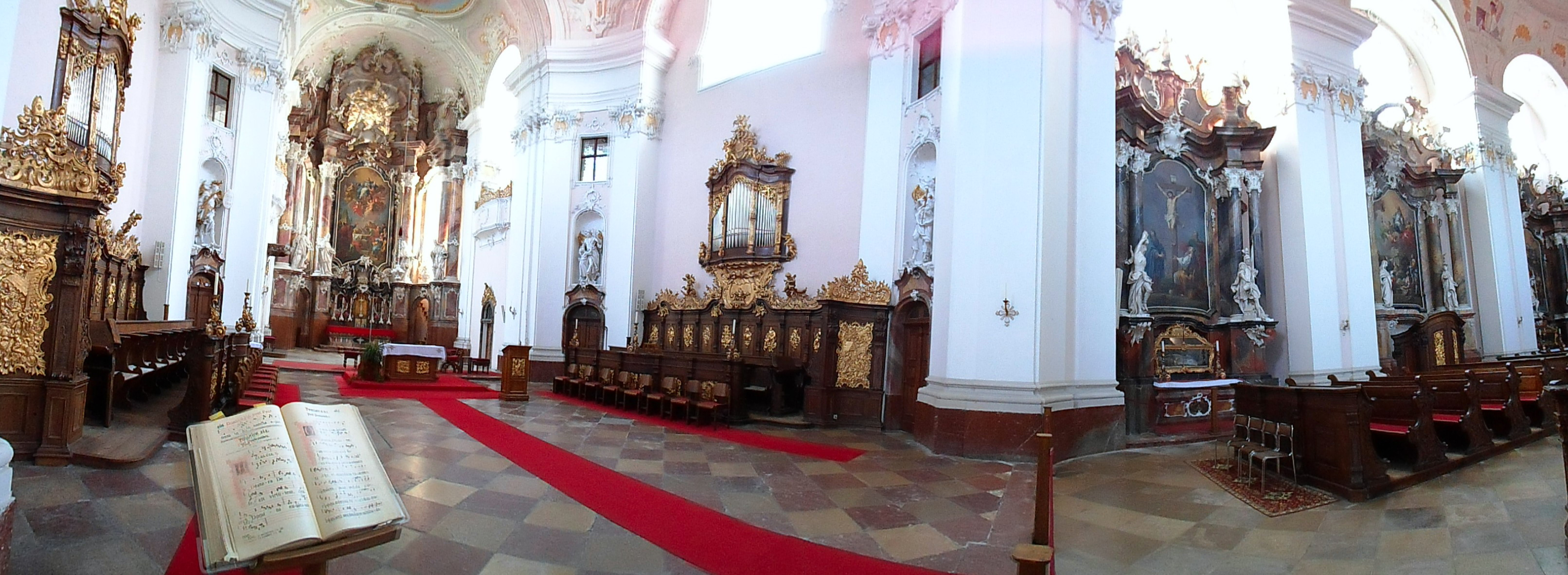 Интериор на абатската църква в Енгелхартсцел на Дунав